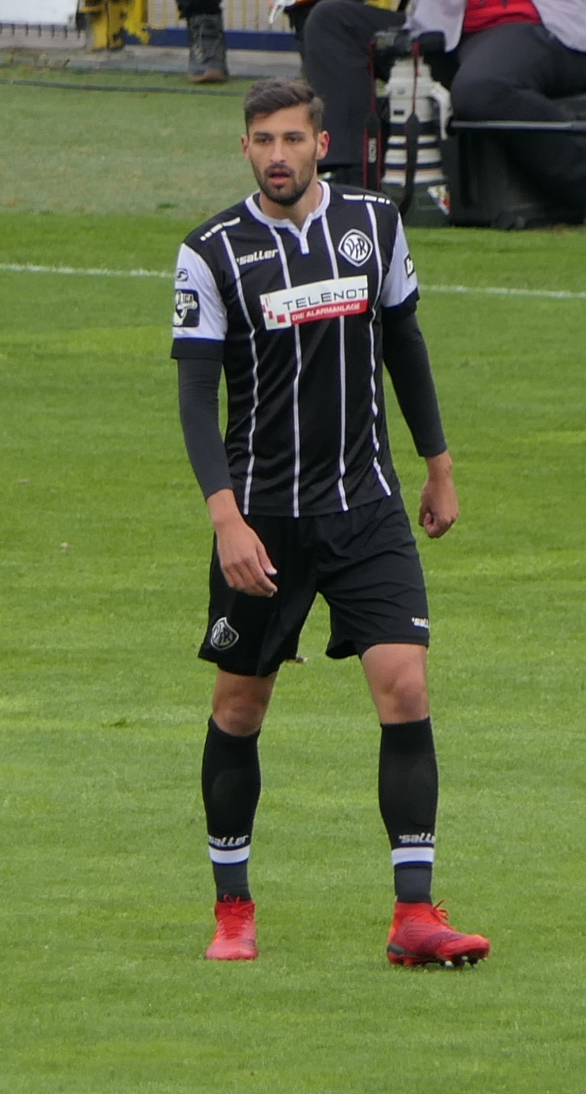 Der Fussballprofi Torben Rehfeldt im Trikot des VfR Aalen beim Heimspiel gegen Eintracht Braunschweig am 05.05.2019.